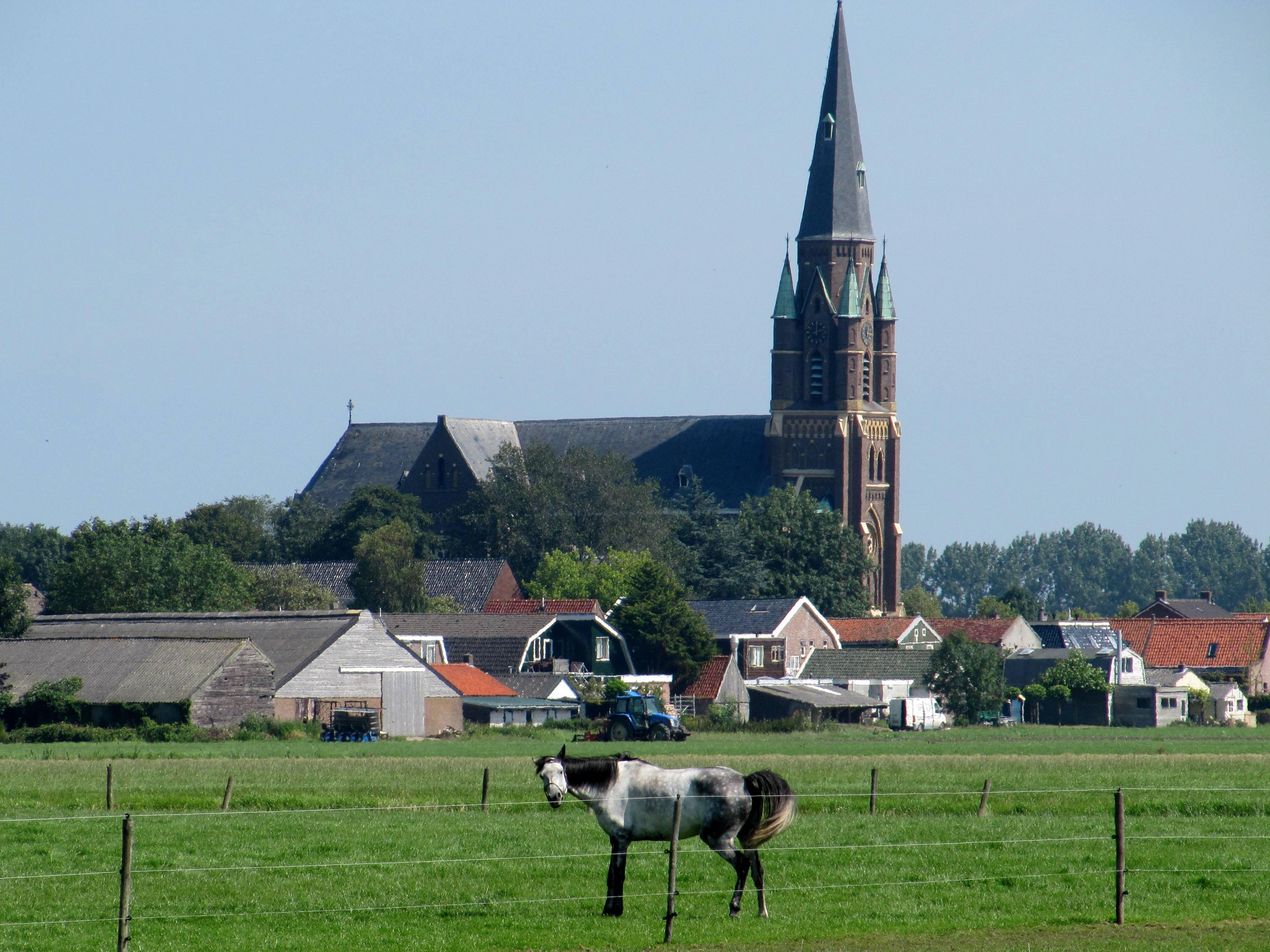 St. Werenfridus, 1874-1875 Th. Asseler. Op de vroege Franse gotiek geinspireerde kruisbasiliek kenmerkend voorbeeld van stucadoorsgotiek. Westtoren met achtkantige bovenbouw, geflankeerd door veelhoekige torentjes.